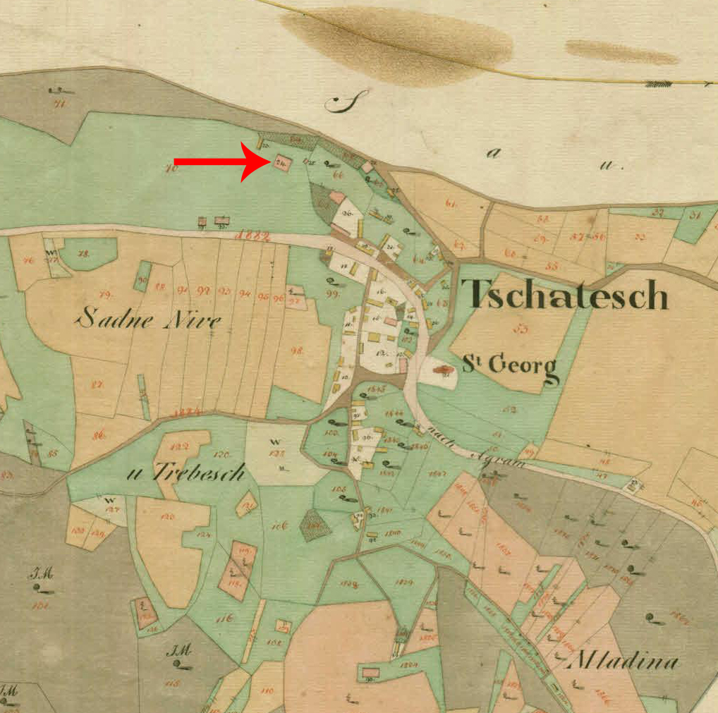 Franciscejski kataster za Kranjsko, 1823-1869